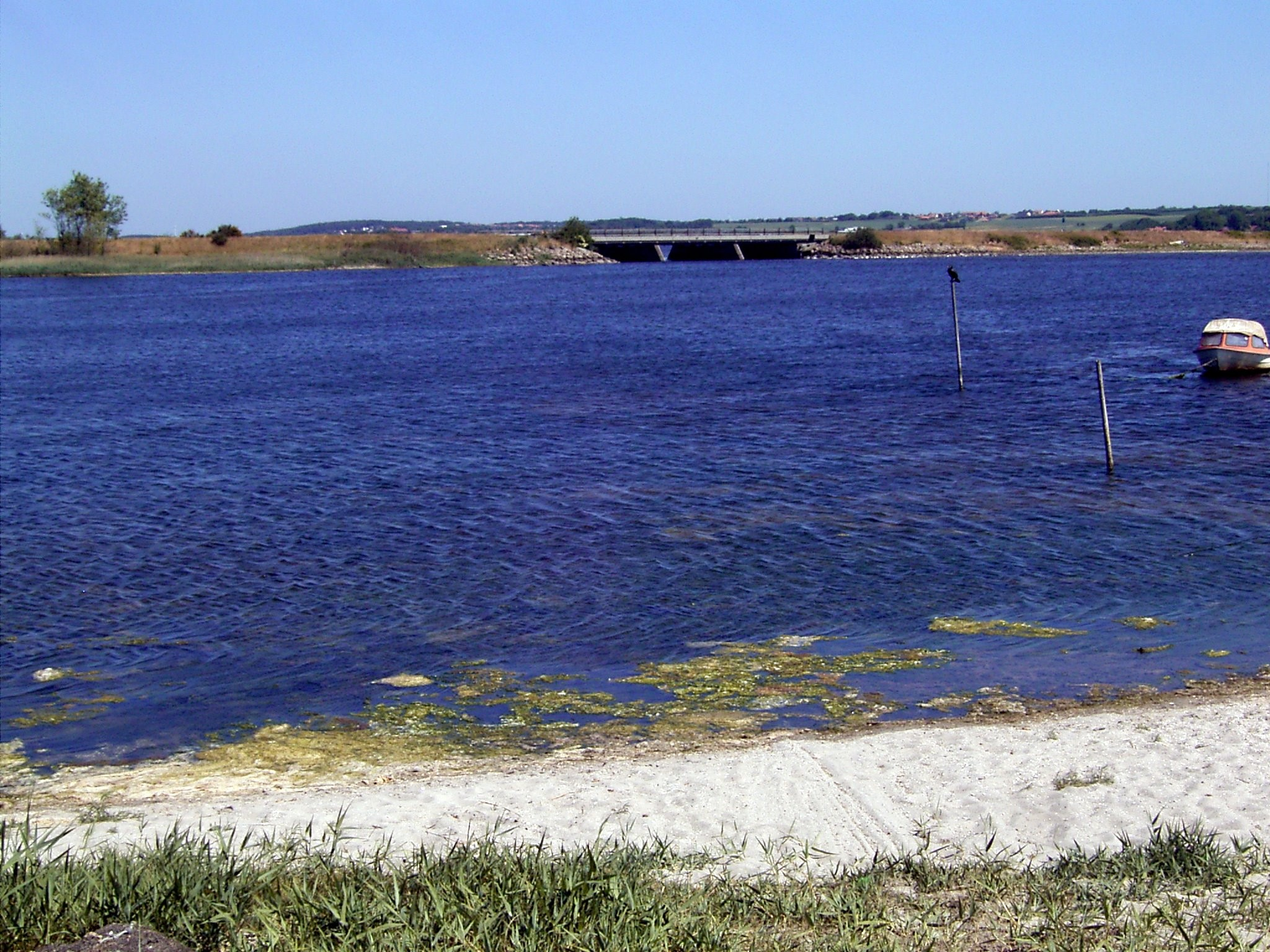 Sebbersund, Aalborg Kommune